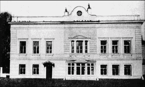 Дом Третьяковых, 1880-е годы